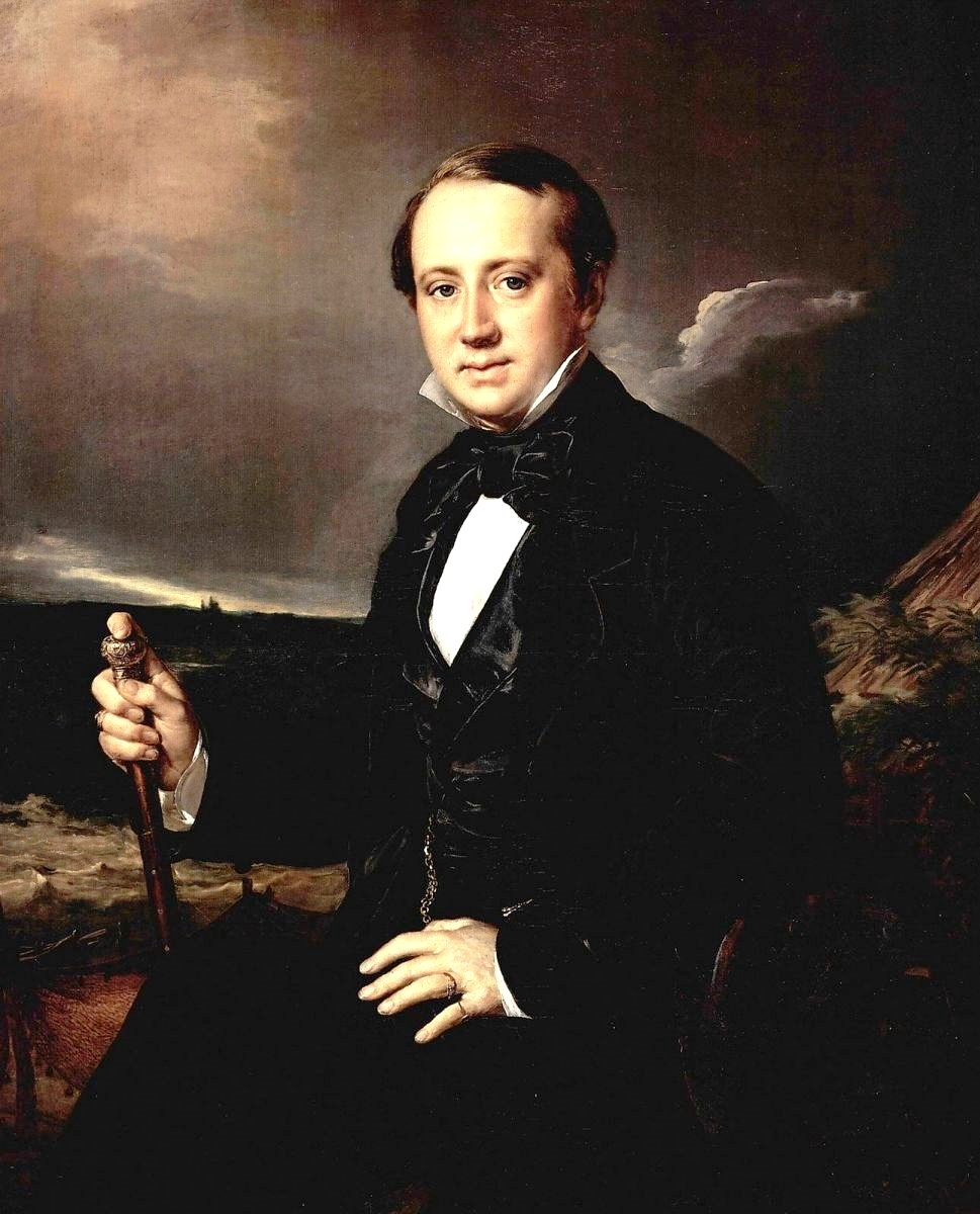 Сапожников Александр Александрович (1852)